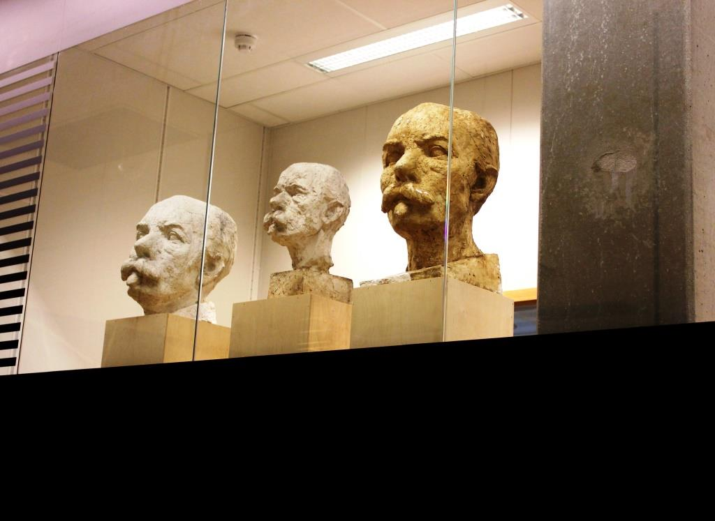 Tre byster av Gunnar Janson, utstilt på Garborgsenteret. Desse er gipskopiar av originalen som står på Arne Garborgs plass i Oslo.